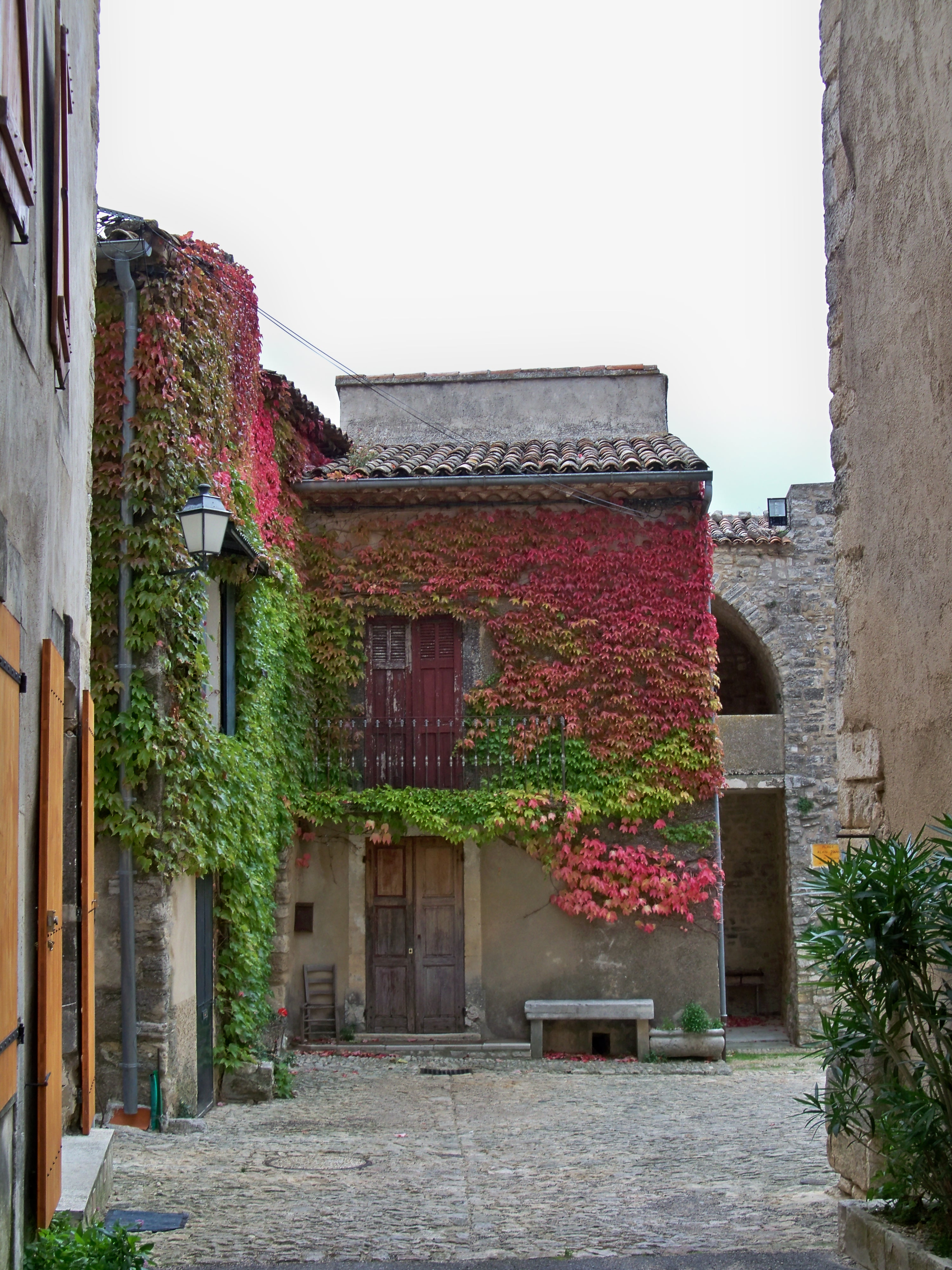 Maison de village à Caseneuve, Vaucluse, France